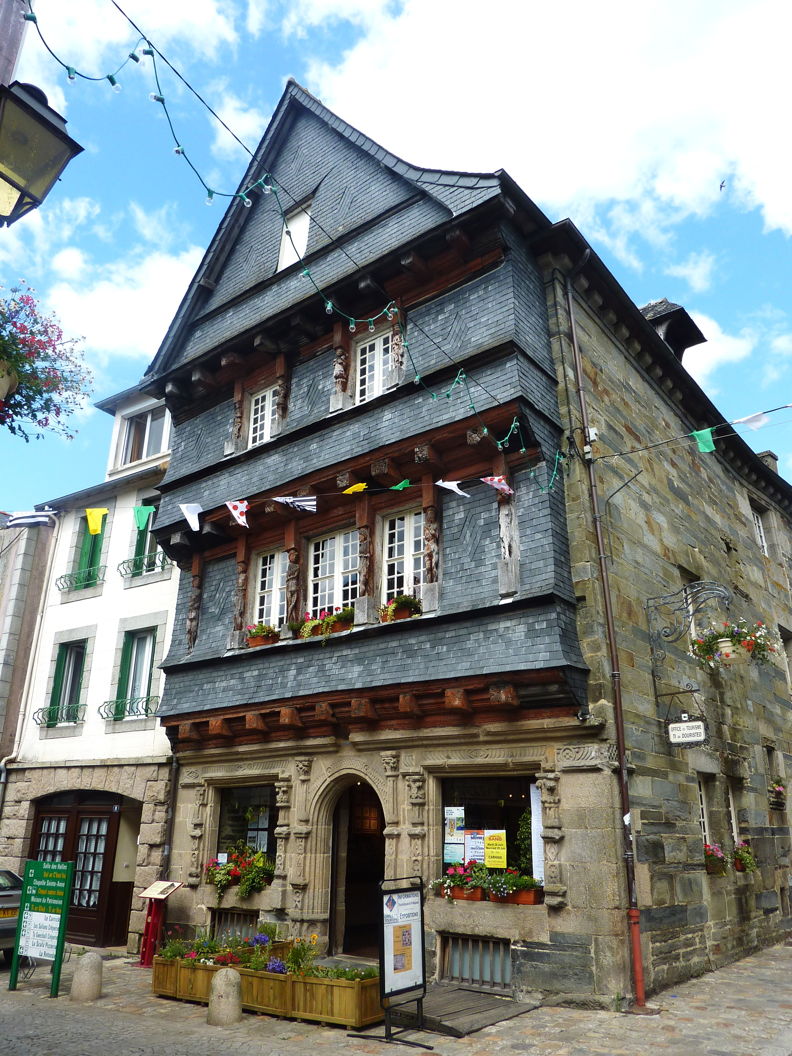 Carhaix-Plouguer : la maison du Sénéchal (XVIe siècle) devenue syndicat d'initiative